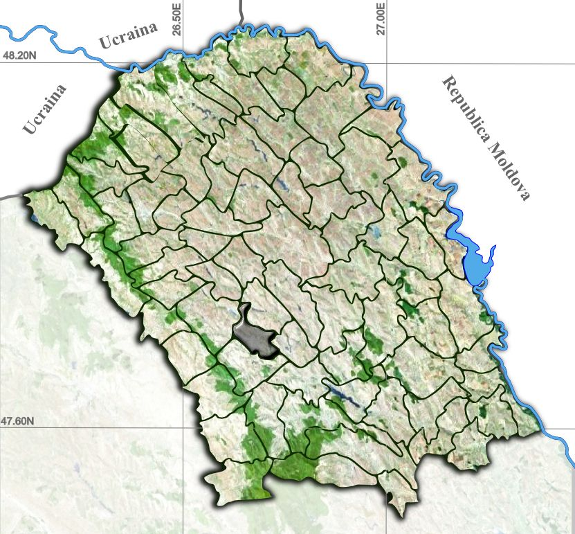 Botosani jud Botosani.